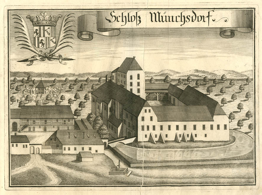 "Schloß Münchsdorf", aus: Beschreibung des Churfürsten- u. Hertzogthumbs Ober- und Nidern Bayrn. Rentamt Landshut, 1723